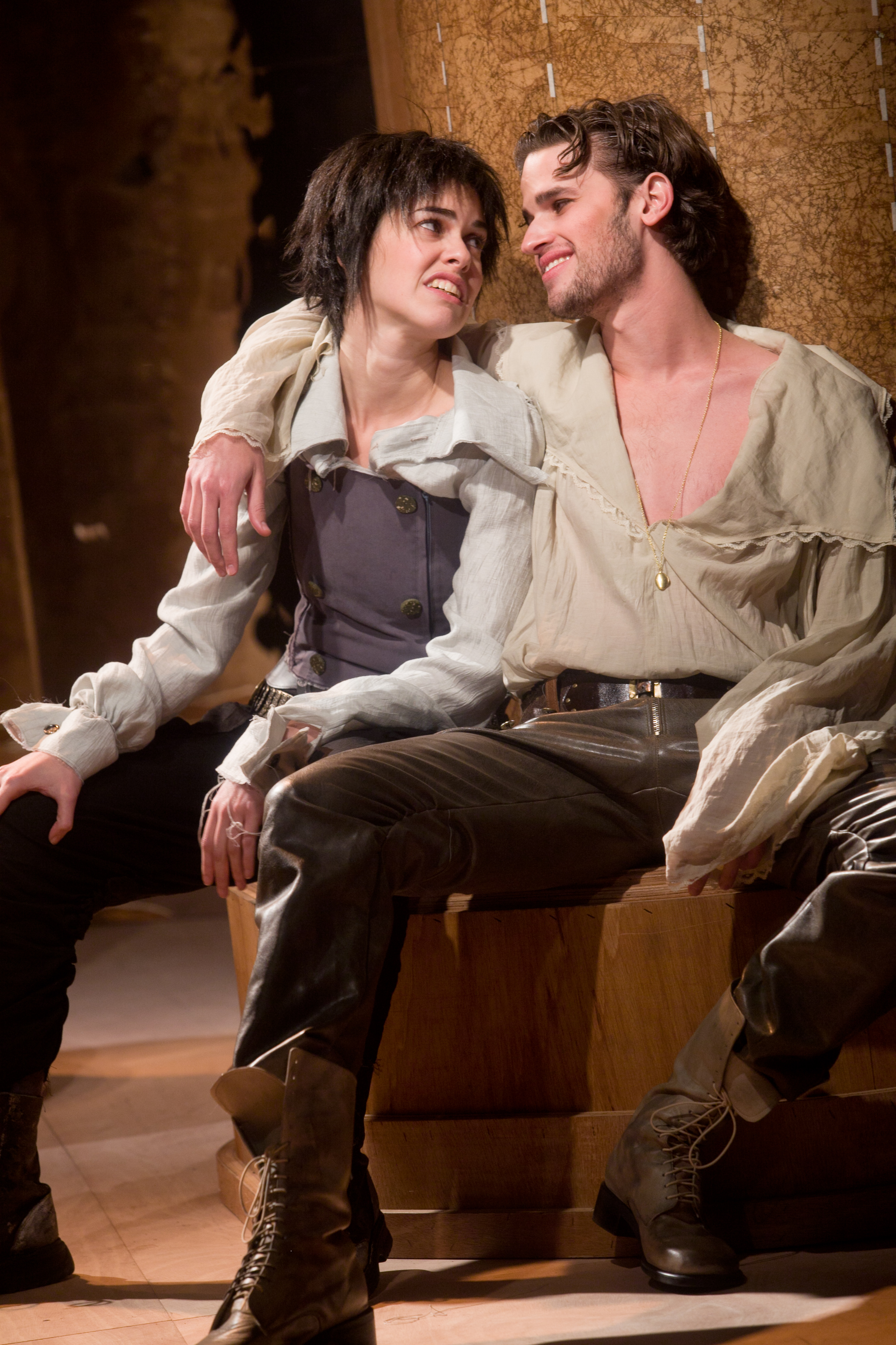 הלילה השנים עשר, תיאטרון החאן